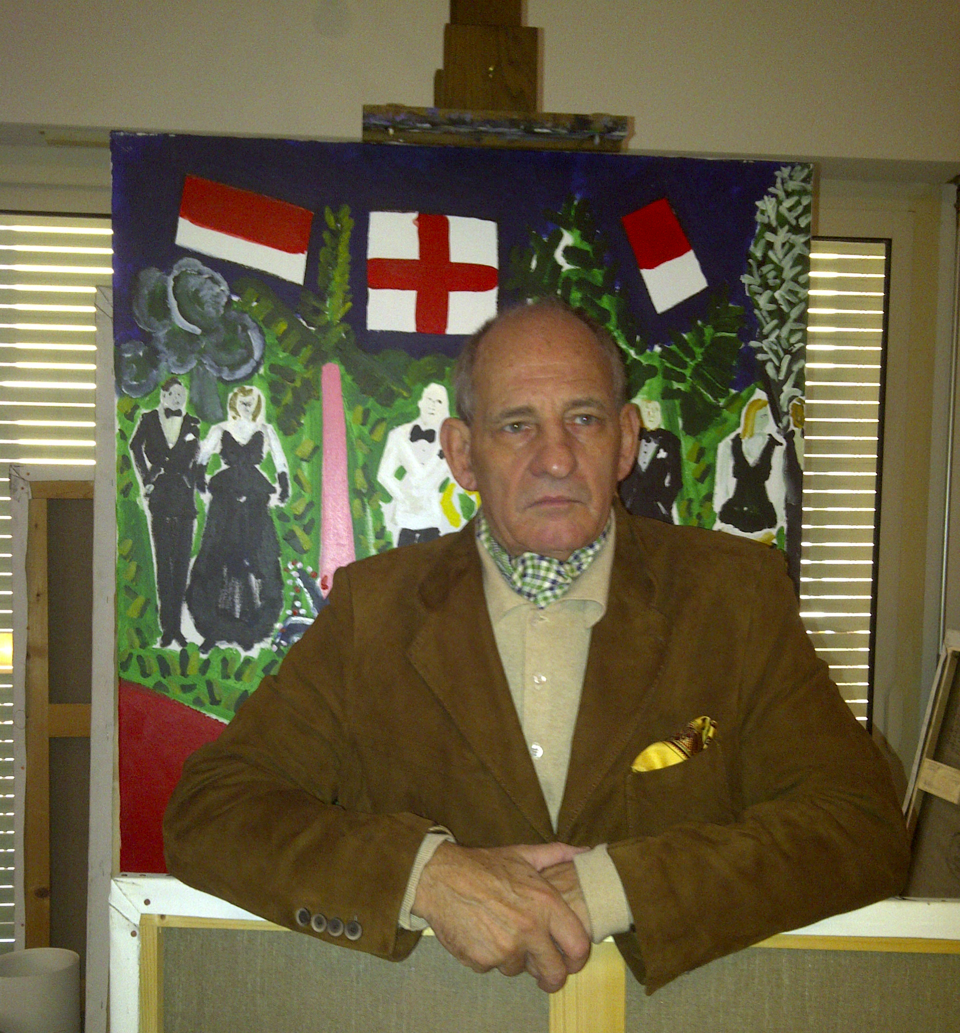 Horacio de Sosa Cordero